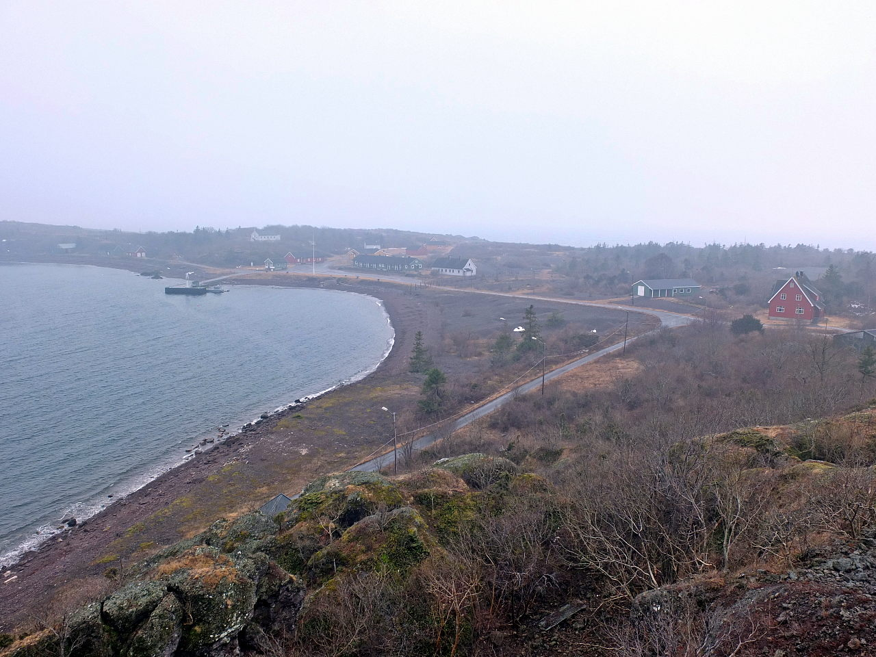 Rauøy fort i Oslofjorden